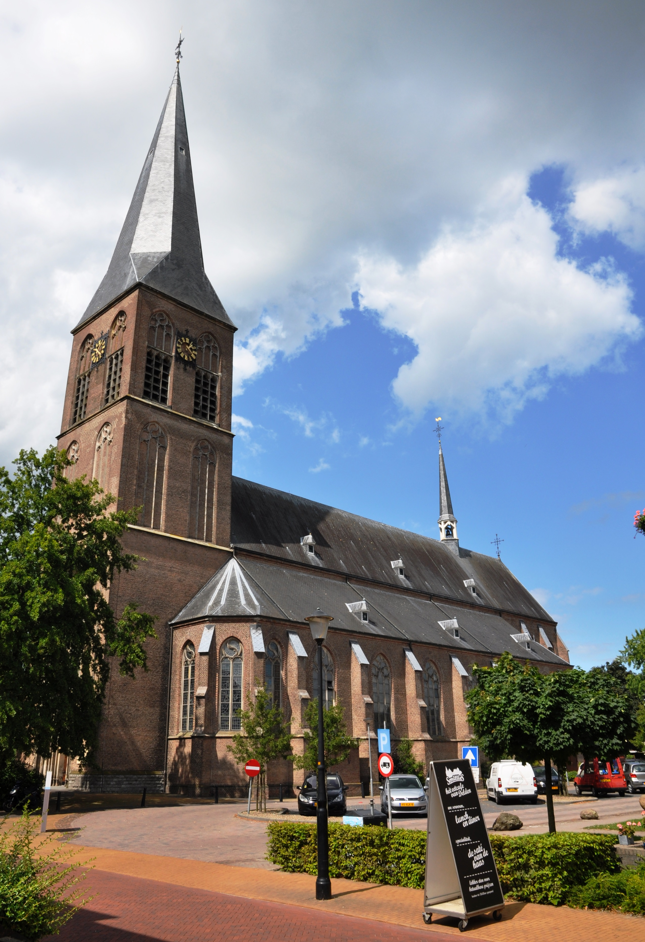 Nieuwe Blasiuskerk in Delden.